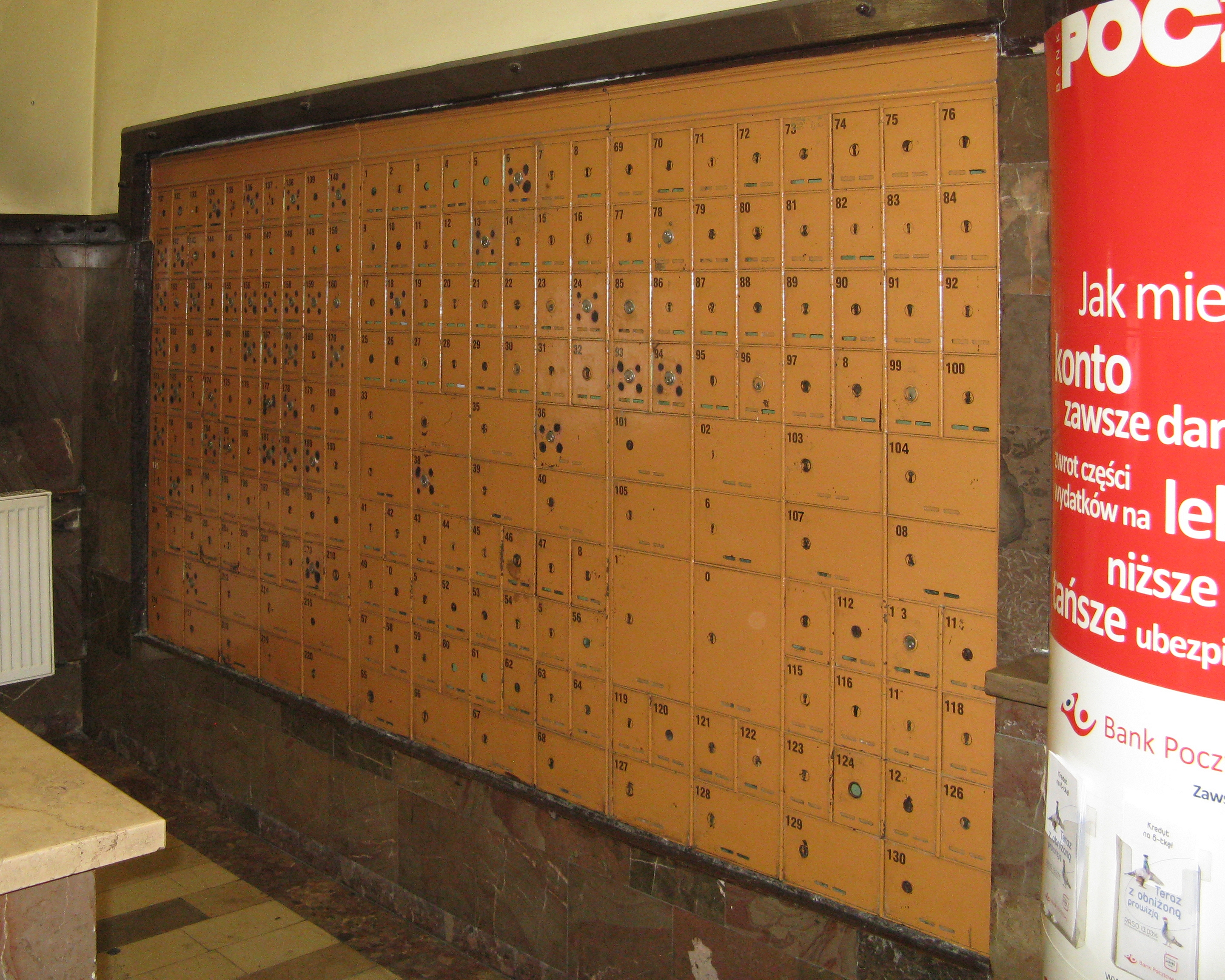 skrytki pocztowe na poczcie przy ul. Karola Miarki 2, po lewej stronie od wejścia